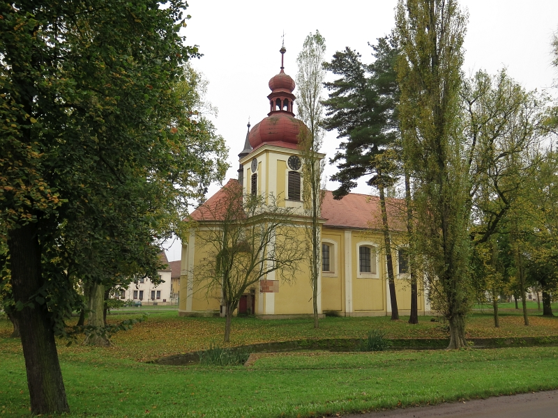 Kostel svatého Jakuba Většího, náves, Kněževes (okres Rakovník).